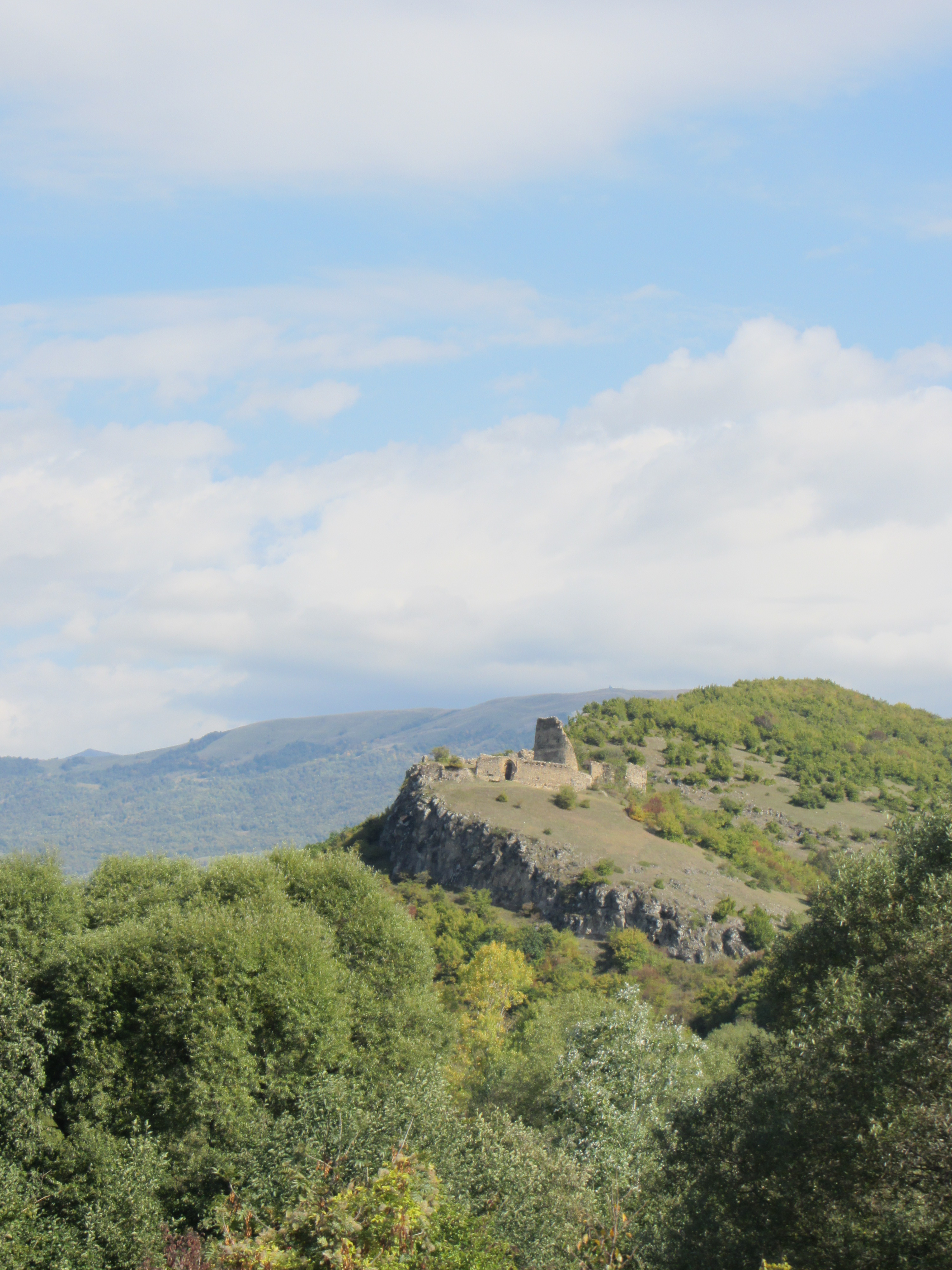 ციხეა